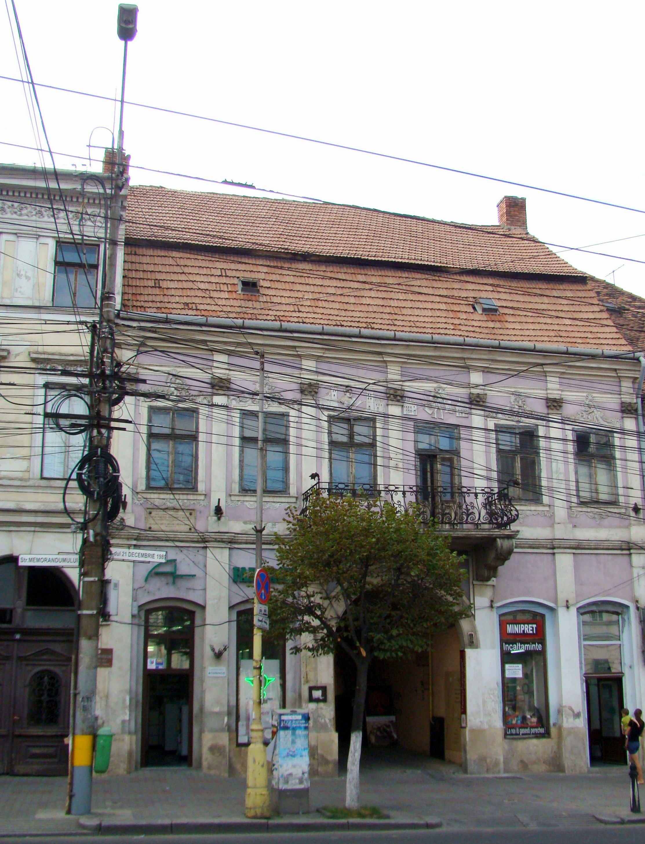 Casă monument istoric, Piața Unirii, nr.27